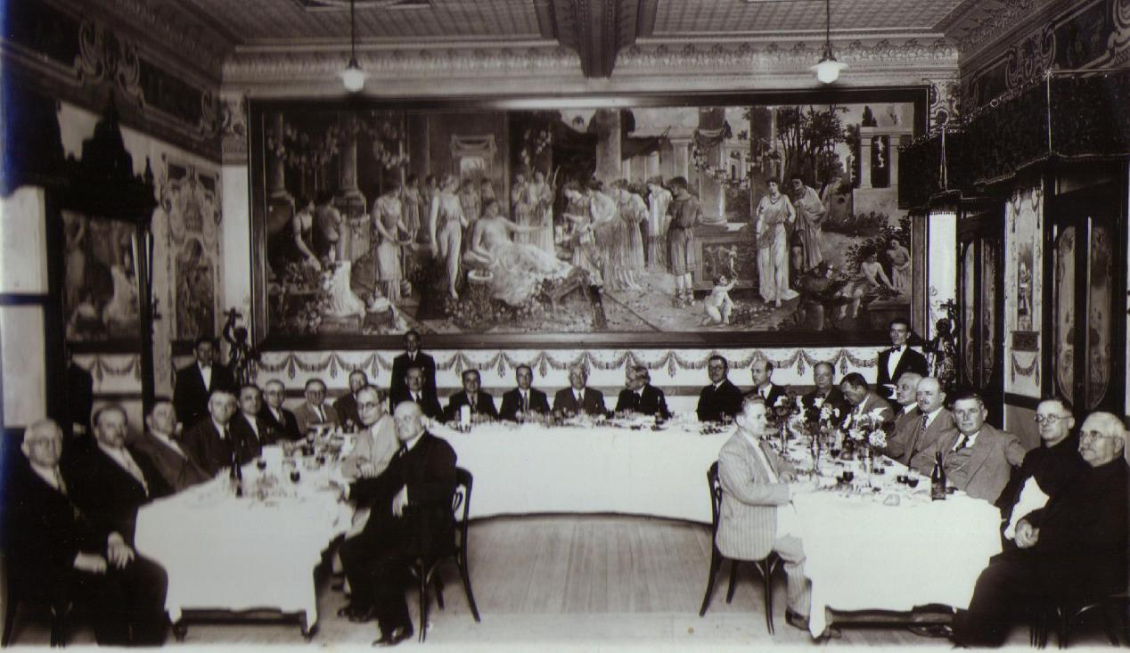 Salão de festas da Confeitaria Rocco.